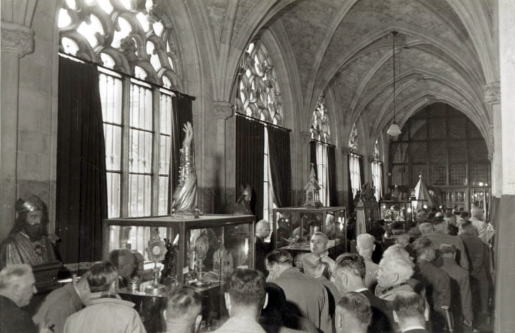 De oude schatkamer van de Onze-Lieve-Vrouwekerk in Maastricht tijdens een bezoek van deelnemers aan het congres van de Vereniging van Nederlandse Gemeenten. De kerkschat was van 1933 tot 1968 gehuisvest in de oostelijke kruisgang. In 1968 volgde de verhuizing naar de huidige schatkamer in een nieuw pand grenzend aan de oostelijke kruisgang. Foto in de collectie van het RHCL in Maastricht